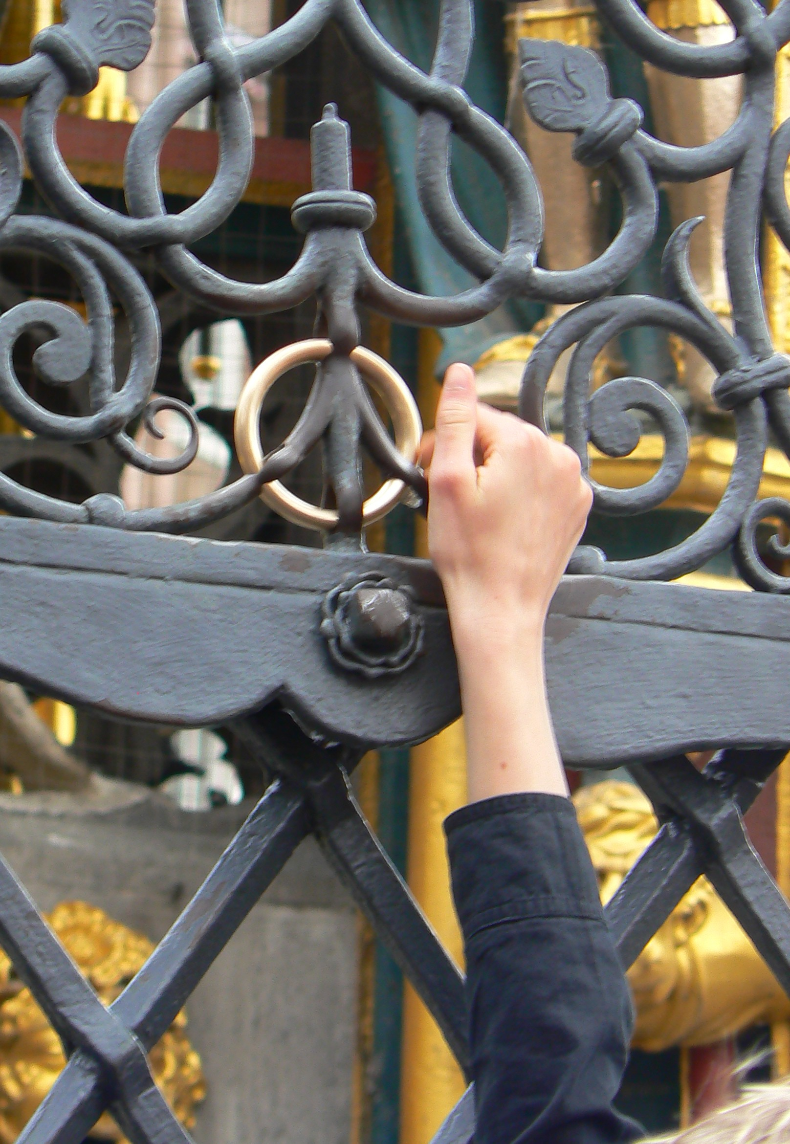 Messingring am Schönen Brunnen in Nürnberg